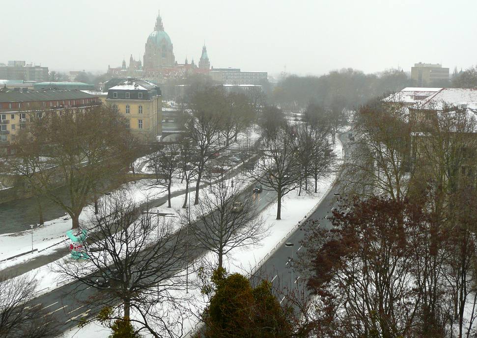 Leibnizufer